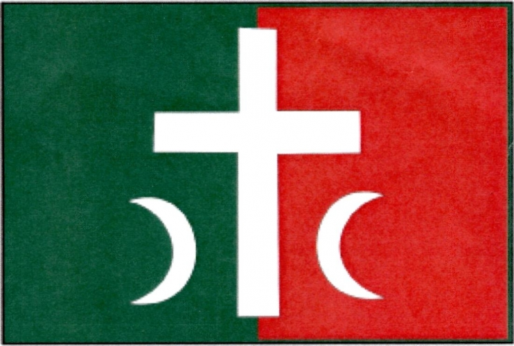 vlajka, Uhřínov, okres Žďár nad Sázavou